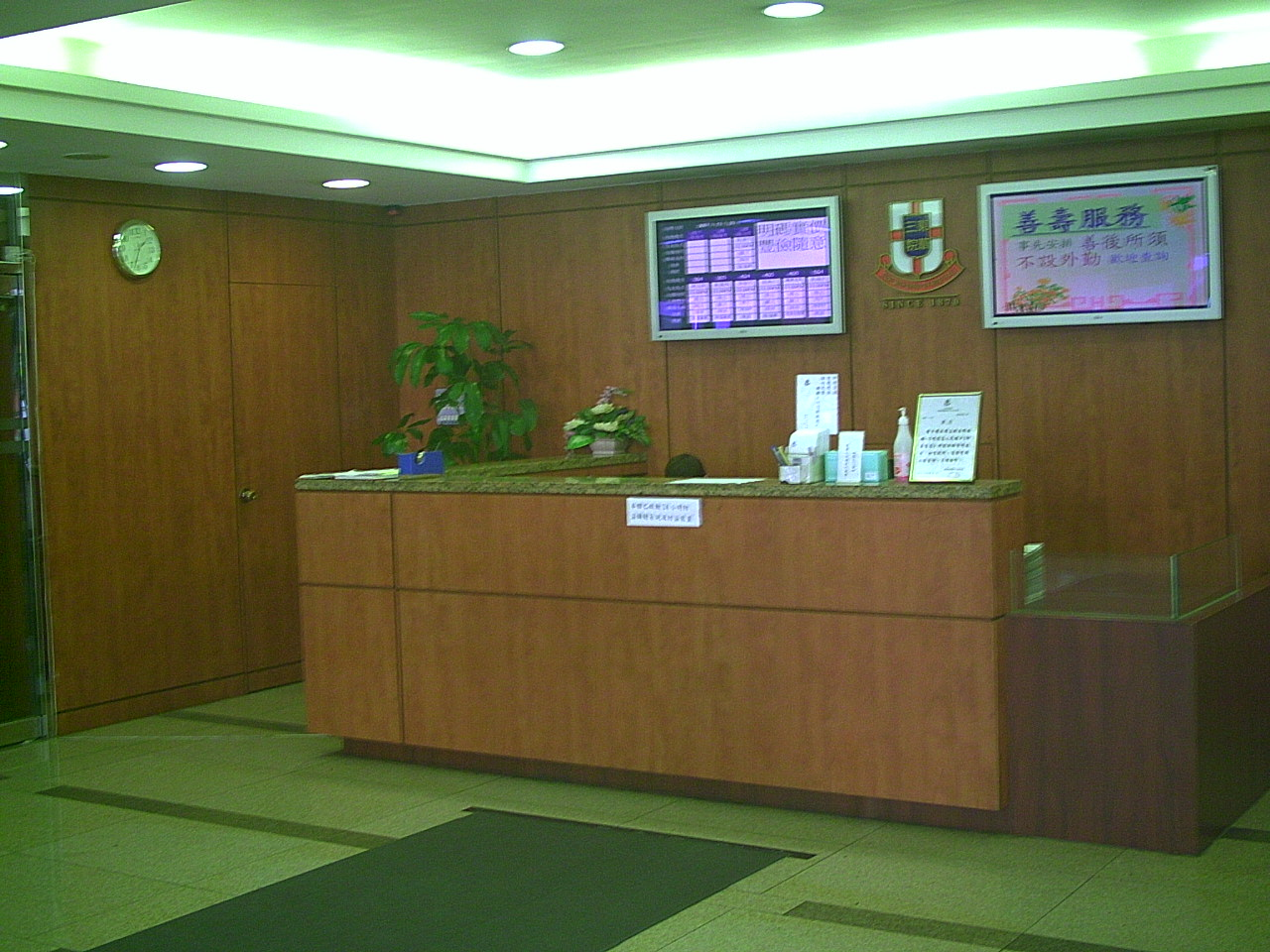 ，是香港一間殯儀館，位於九龍紅磡，為香港主要的殯儀館之一。 Photo created by .